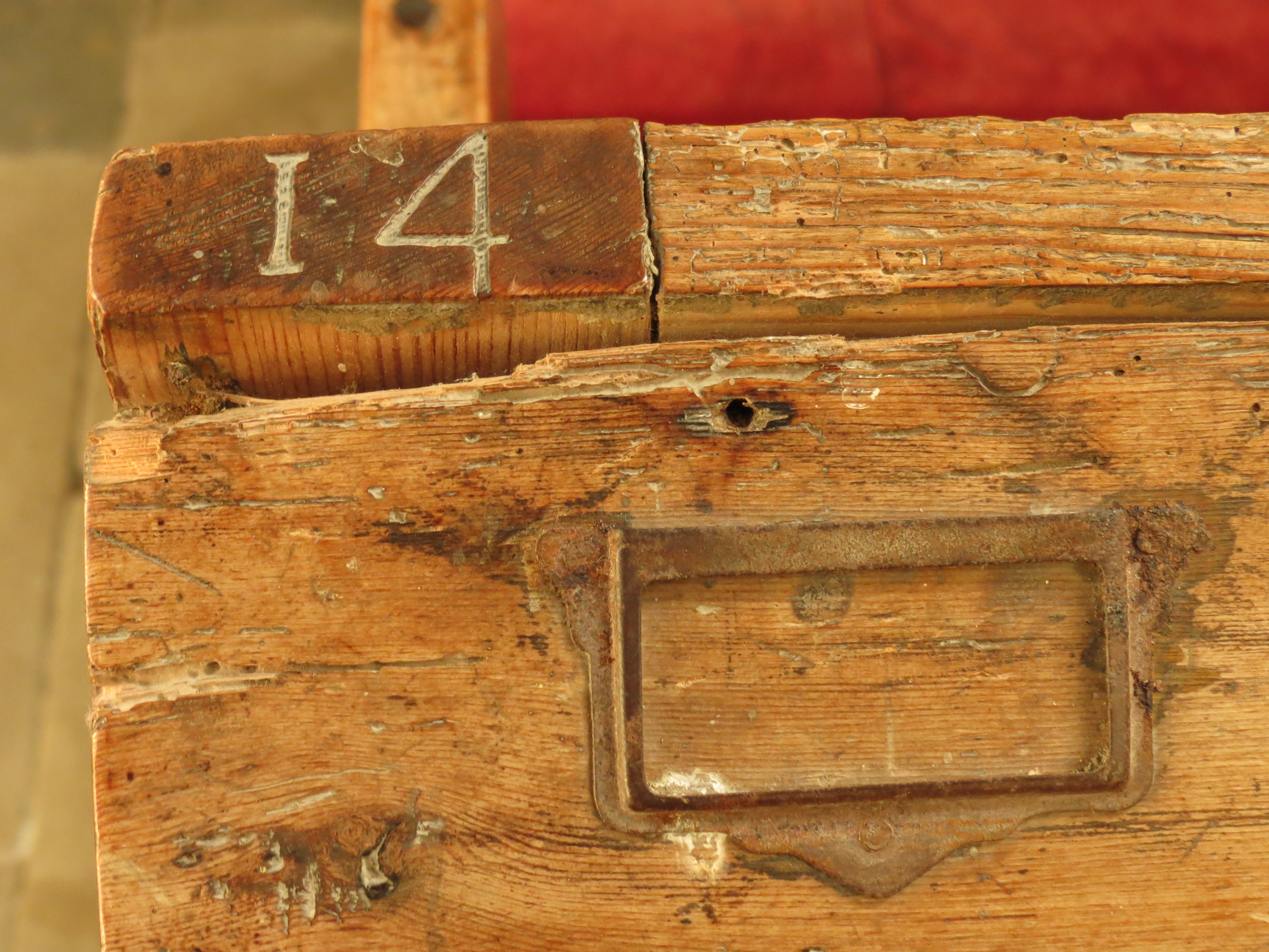 Mosles église